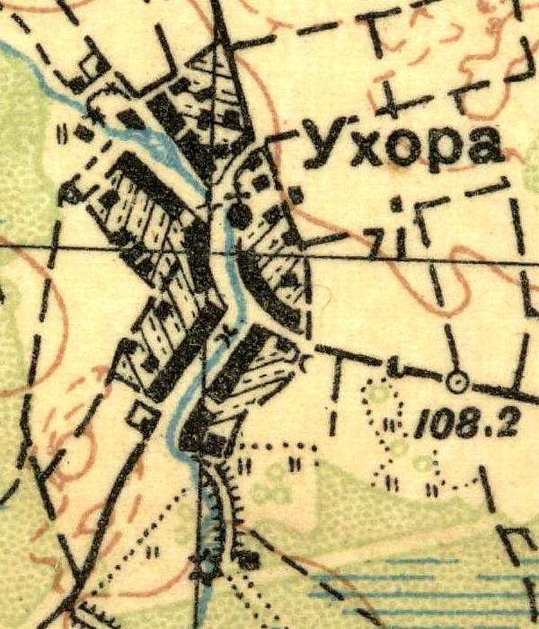 Топографическая карта Ленинградской области, квадрат О-35-23-Г (Волосово), деревня Ухора